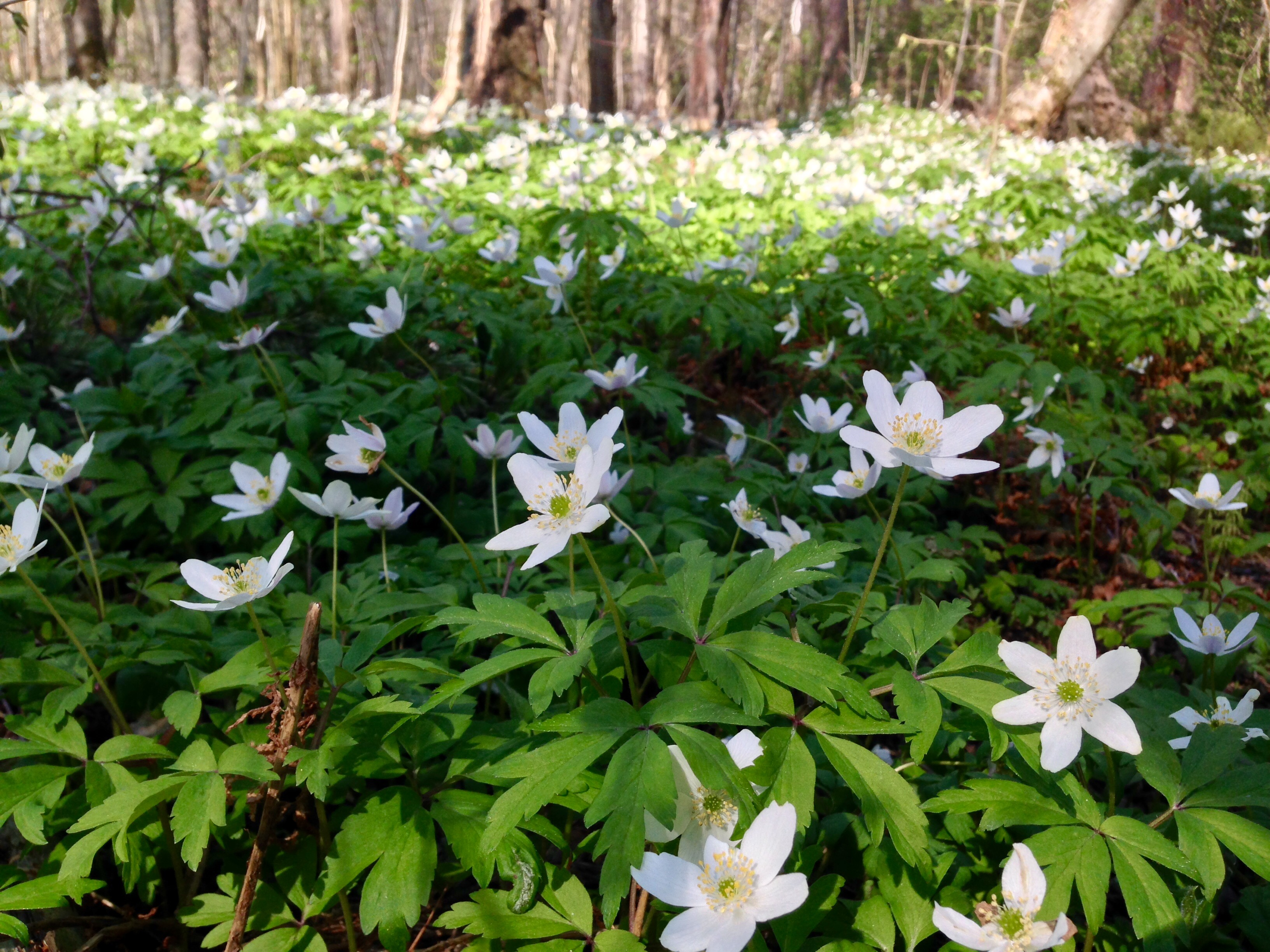 Ветреница дубравная, Anemone nemorosa